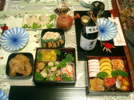 Naujų metų maistas Japonijoje